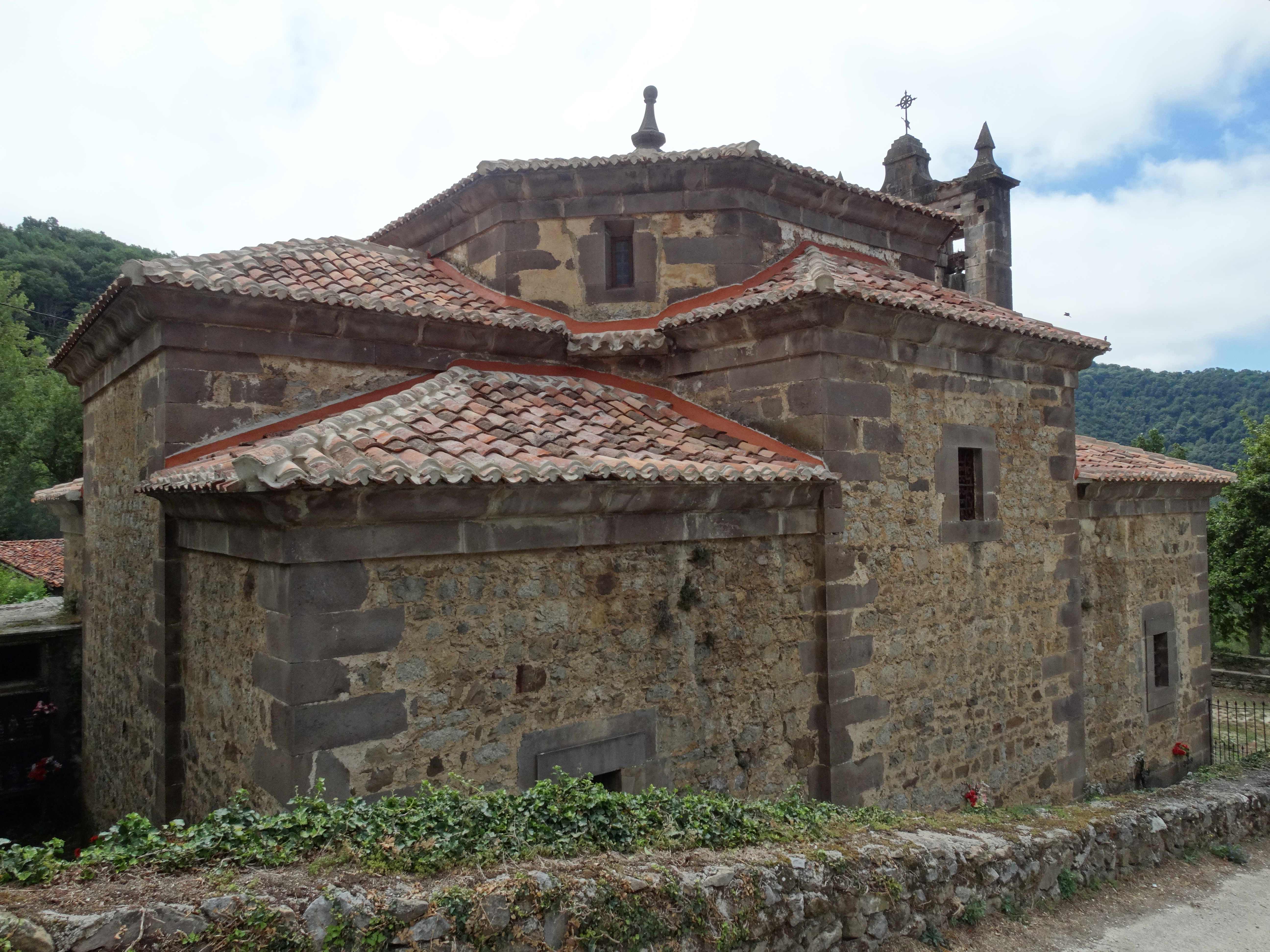 Salarzón es una localidad del municipio de Cillorigo de Liébana, en la comarca de Liébana (Cantabria, España). Iglesia neoclásica de principios del siglo XIX mandada construir por el conde de la Cortina Vicente Gómez de la Cortina y Salceda.